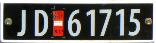 Skilt til rallybil